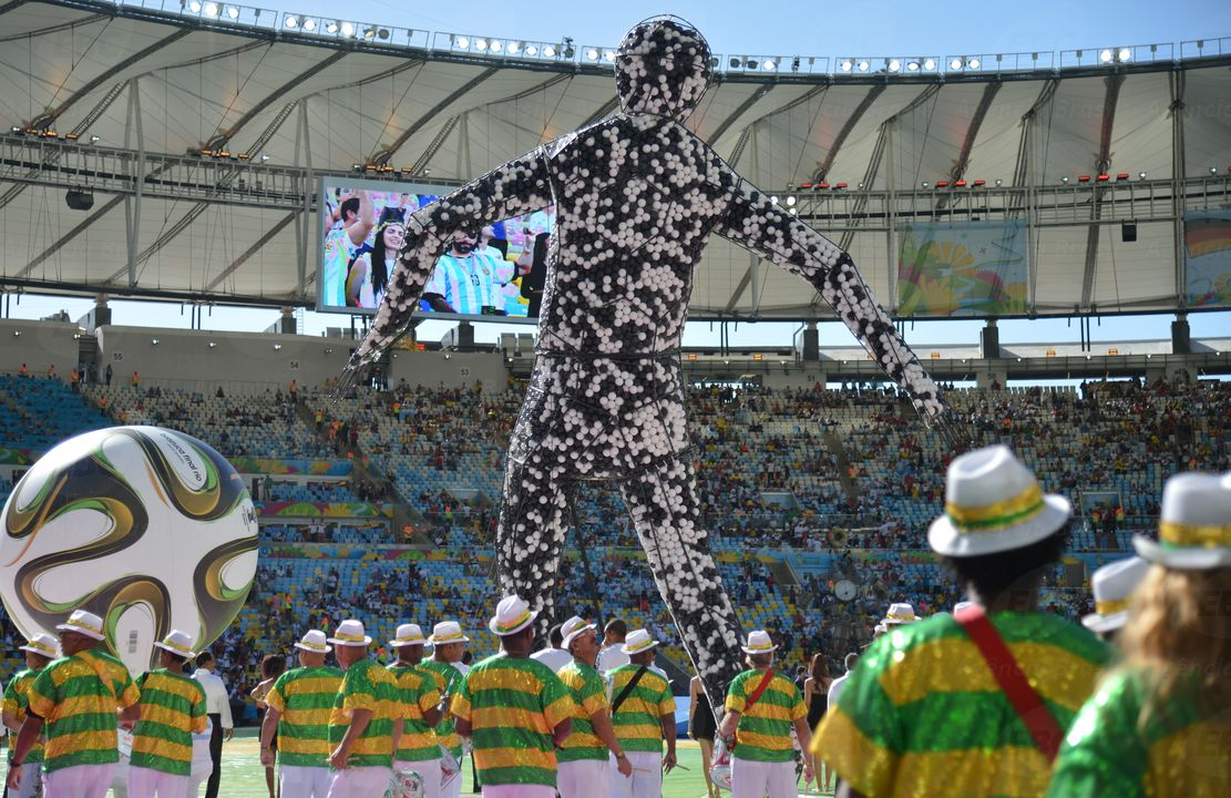 Cerimônia de encerramento da Copa do Mundo FIFA de 2014.